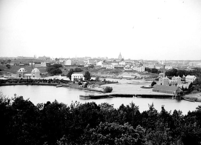 Skanstullsverket vid Årstaviken i Stockholm